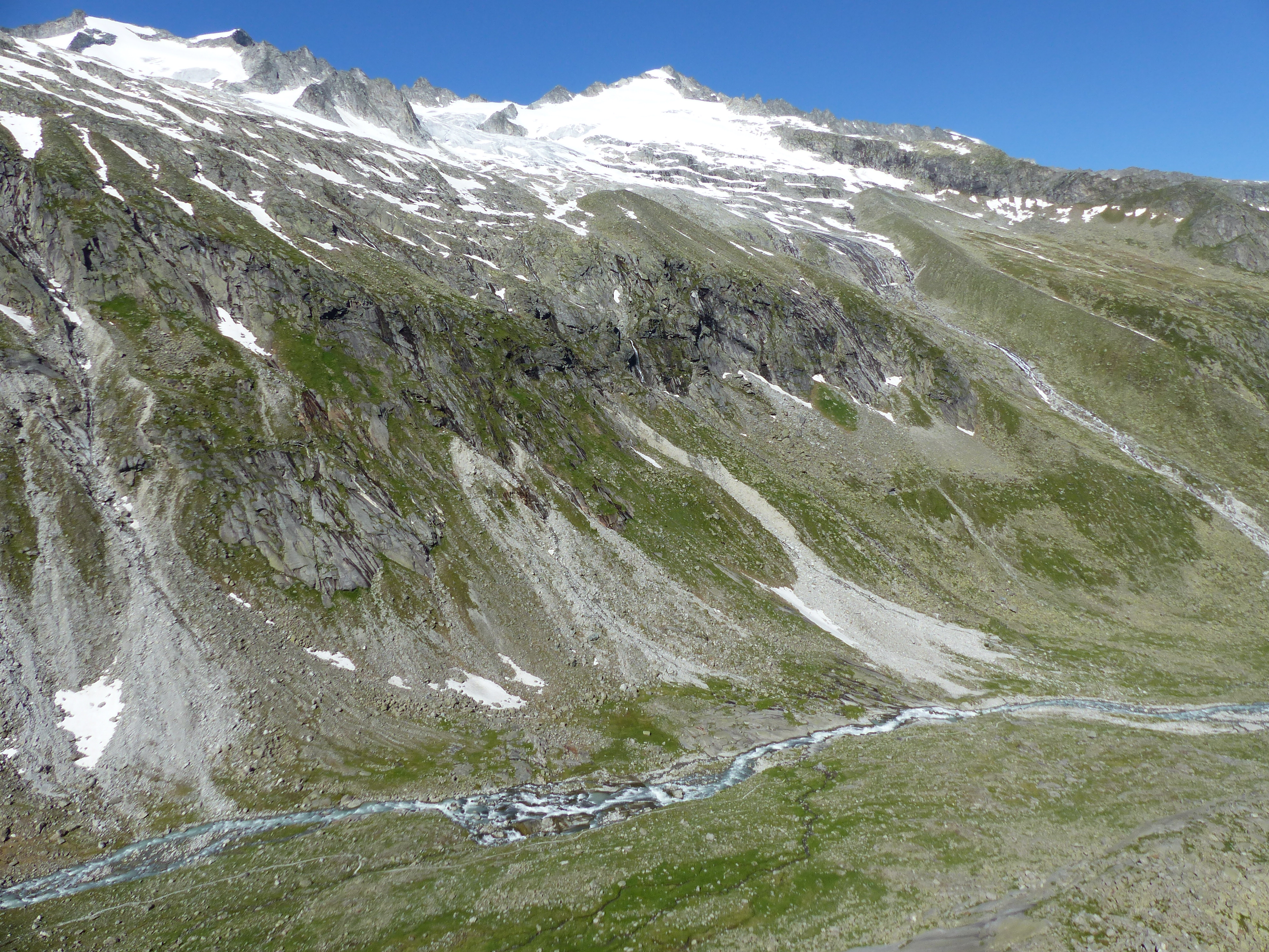 Oberes Obersulzbachtal mit Gletscherlehrweg (aufgenommen vom Aufstiegsweg zur Kürsinger Hütte)